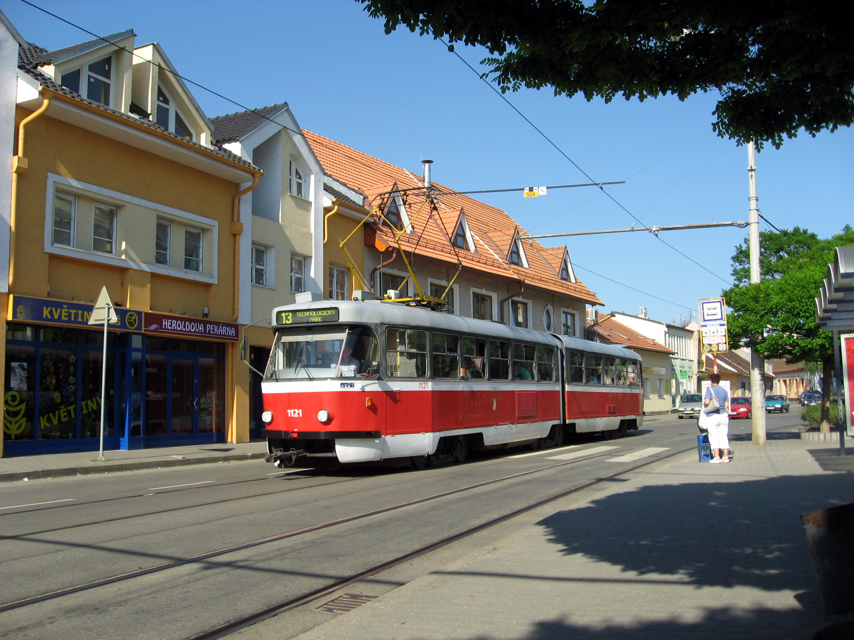 Tatra K2 na Geislerově